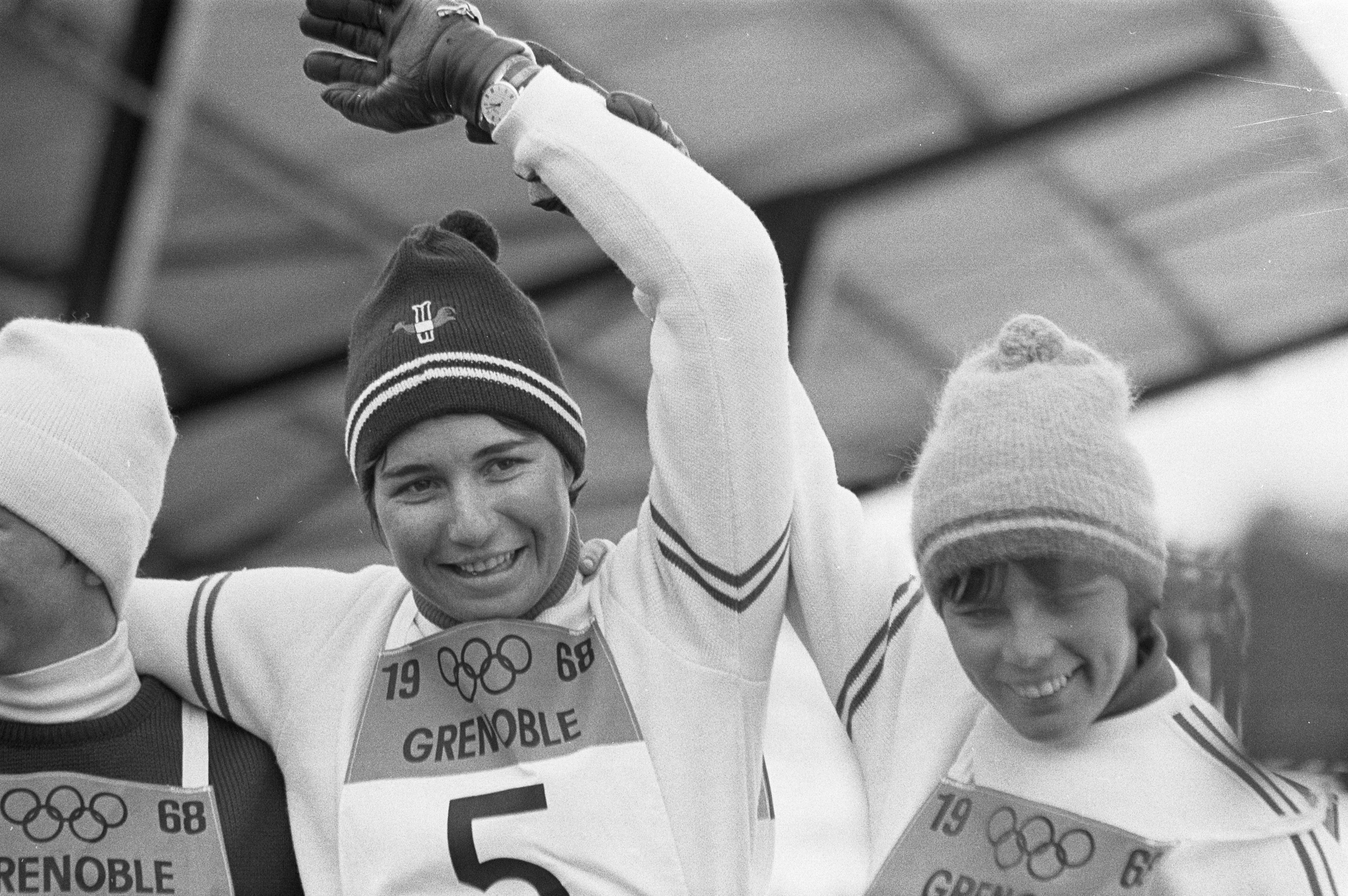 Collectie / Archief : Fotocollectie Anefo Reportage / Serie : [ onbekend ] Beschrijving : Olympische Spelen Grenoble, ski-slalom dames, Marielle Goitschel (Frankrijk, links) na haar overwinning, naast haar Annie Famose (Frankrijk) die 3e werd Datum : 13 februari 1968 Locatie : Frankrijk, Grenoble Trefwoorden : skien, sport Persoonsnaam : Famose Annie, Goitschel Marielle Fotograaf : Kroon, Ron / Anefo Auteursrechthebbende : Nationaal Archief Materiaalsoort : Negatief (zwart/wit) Nummer archiefinventaris : bekijk toegang 2.24.01.05 Bestanddeelnummer : 921-0885